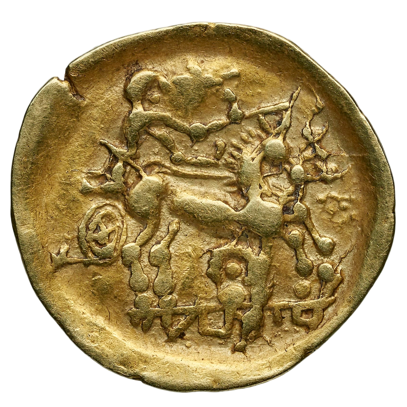 Quart de statère des Helvètes. Revers : Aurige guidant un char. Or, 1,8 gr. diamètre environ 15,5 mm. vers -200. Collection BnF : 9321A (GAU-9785)